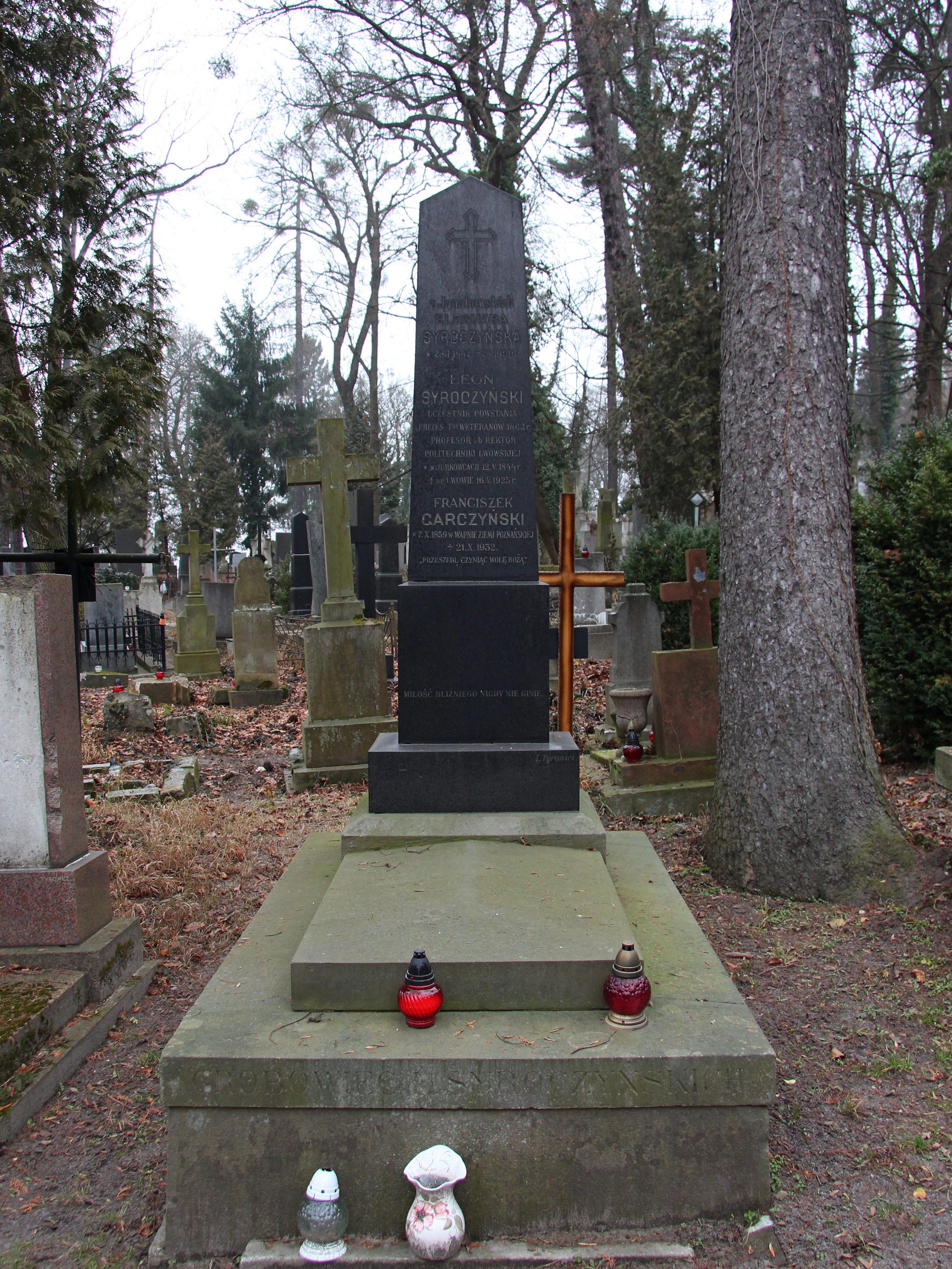 Гробівець родини Сирочинських.Личаківський цвинтар, поле № 13.